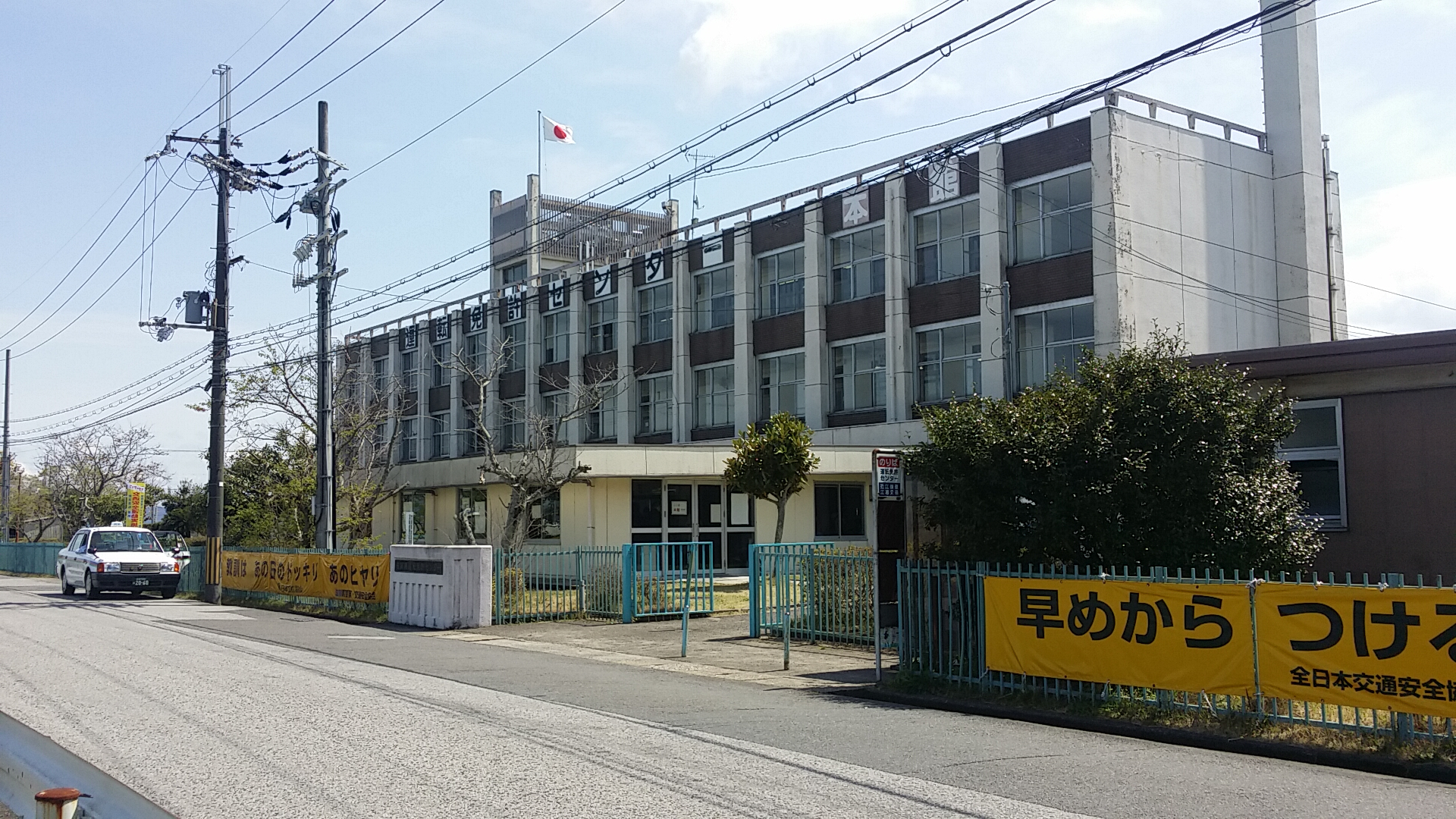 滋賀県運転免許センター 外観